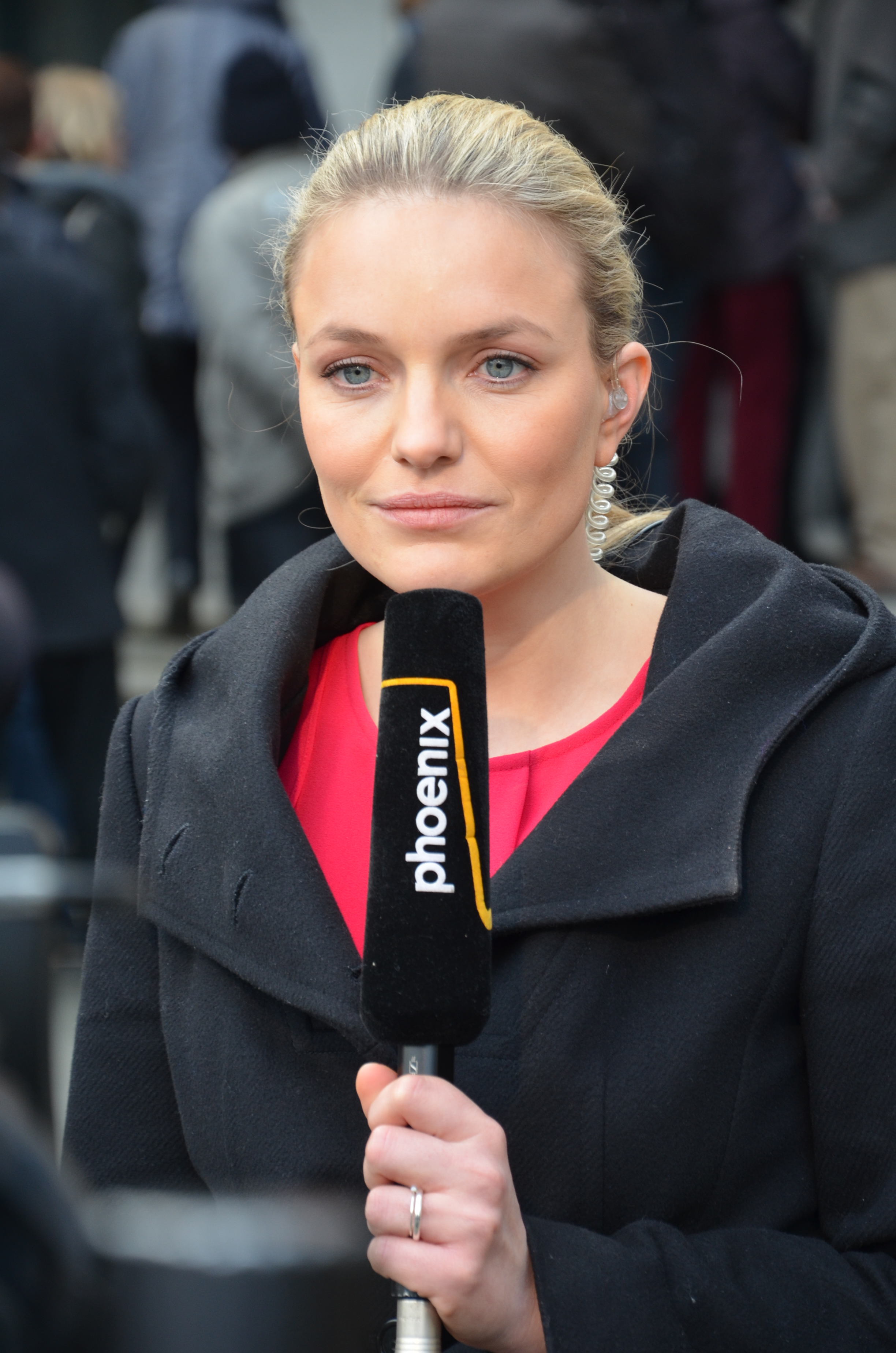 Ein Eindruck vom Tag des Freispruches für Bundespräsident a.D. Christian Wulff und David Groenewold vor dem Landgericht Hannover: Sarah Tacke bei einem Bericht für den Fernsehsender Phoenix